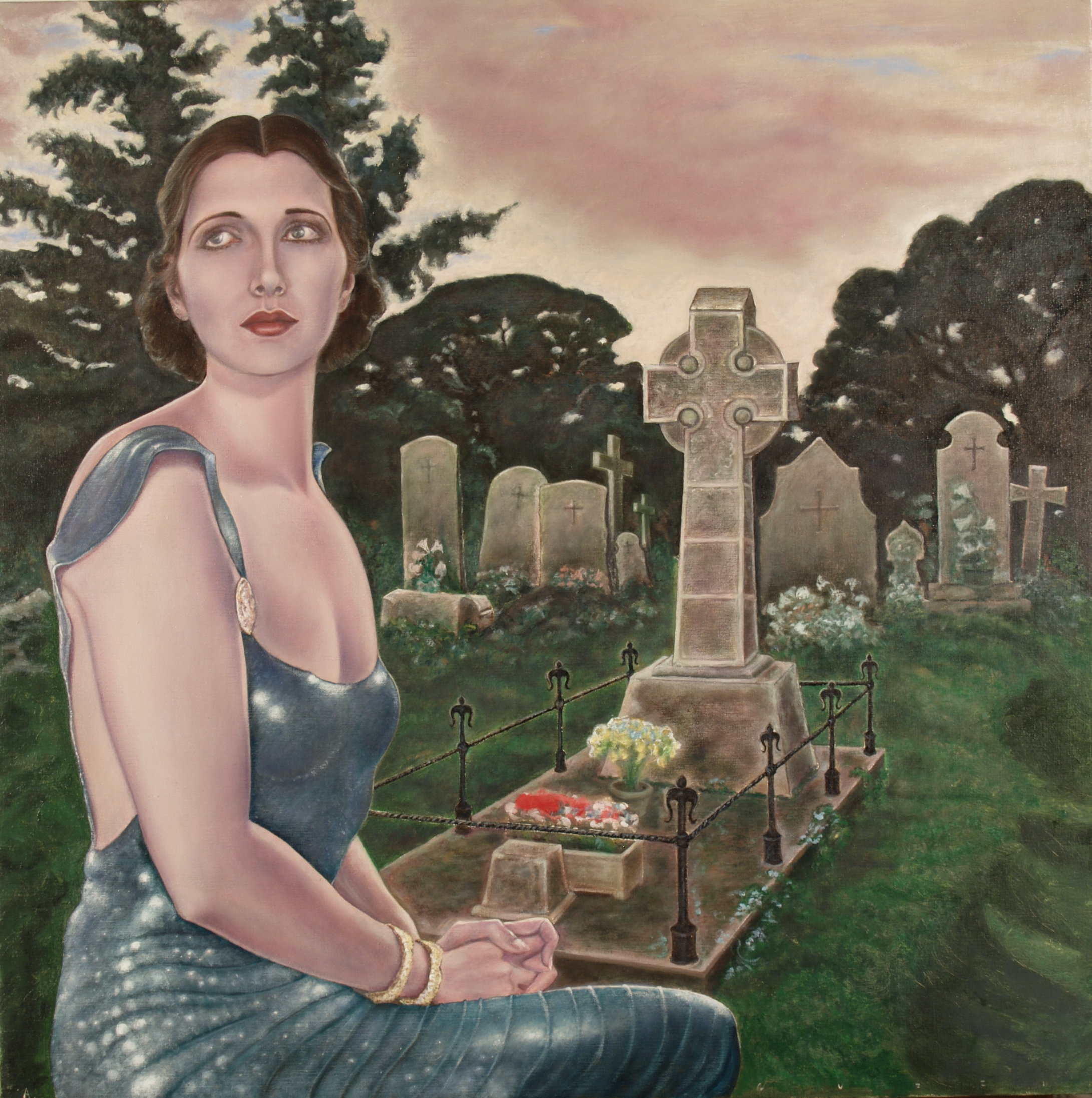 Il punto radiante, olio su tela di lino, cm 85x85